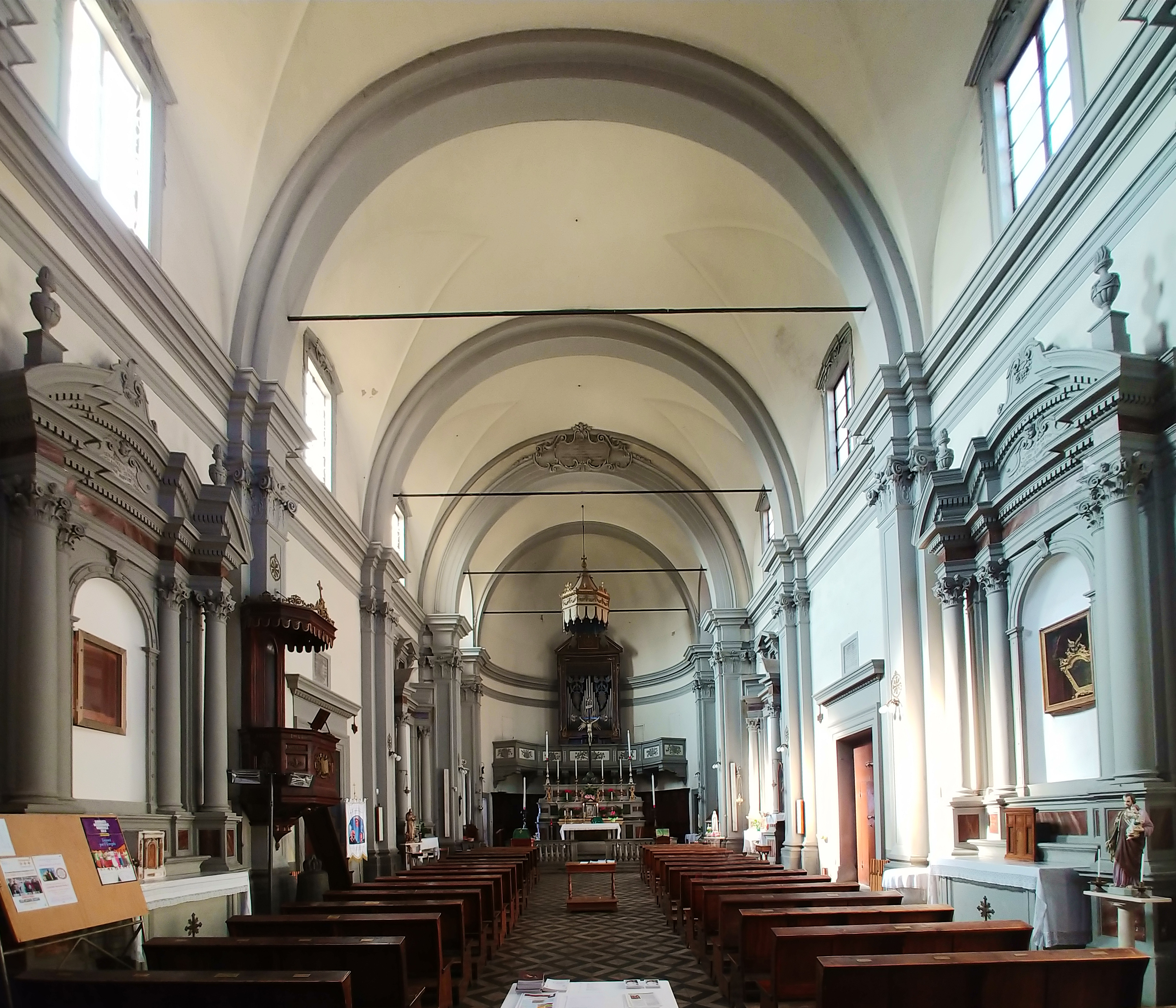 Interno.